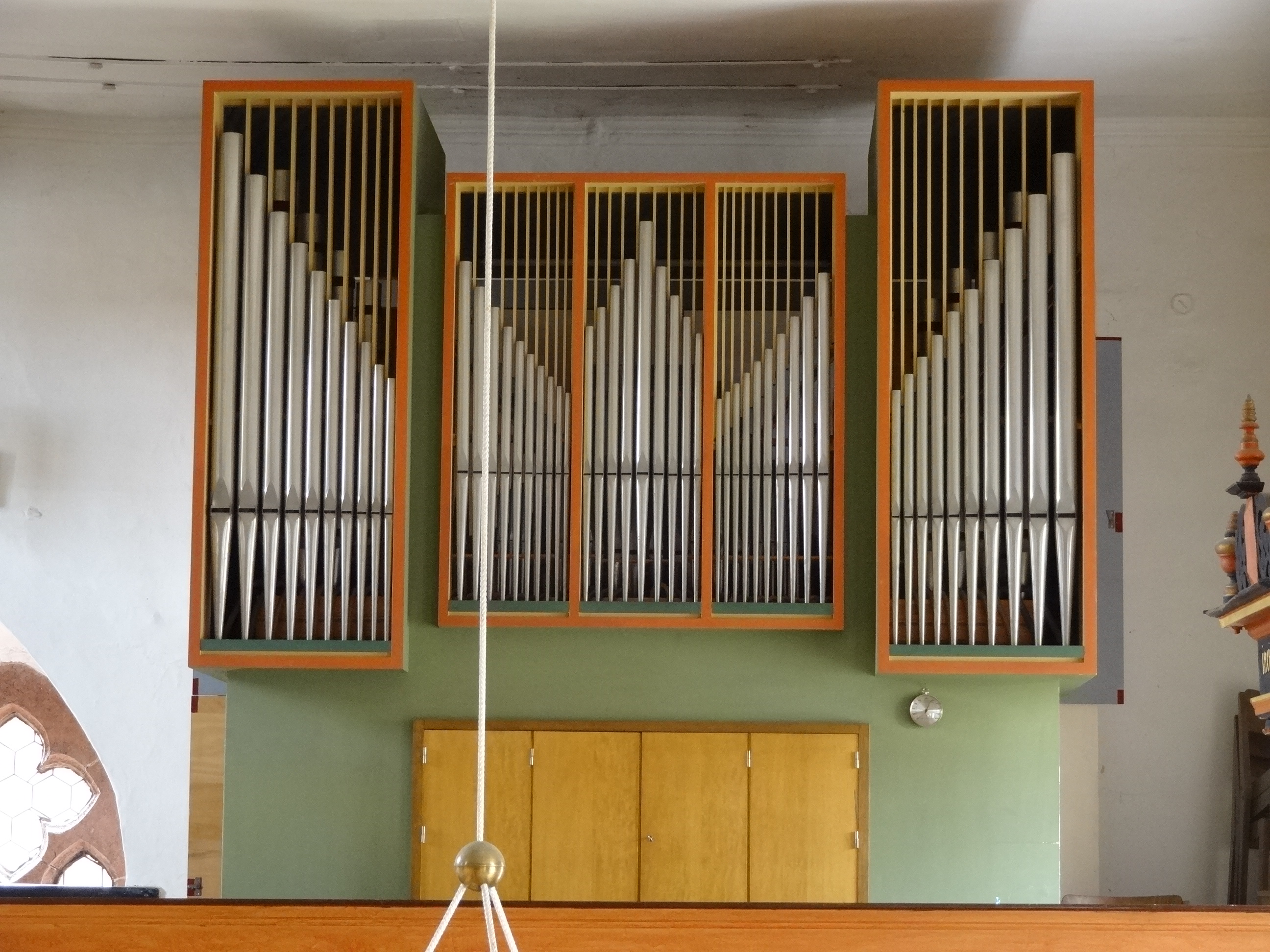 Evangelische Kirche (Ulfa)